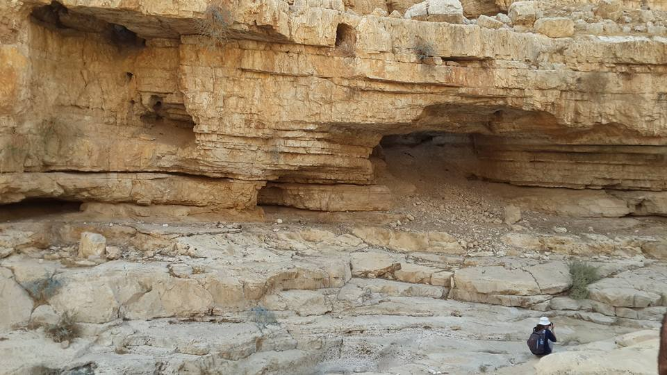 يقع وادي المقلق بالقرب من منطقة النبي موسى في أريحا